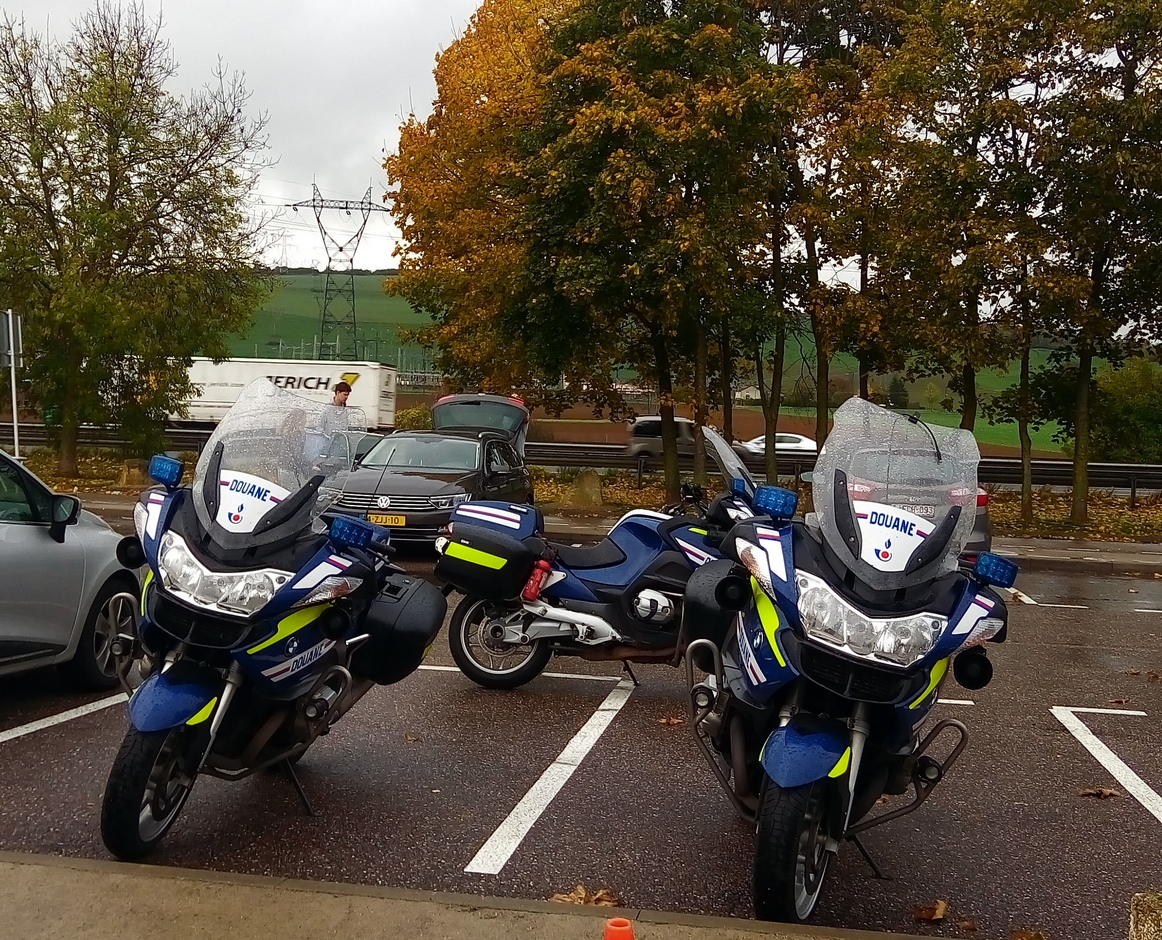 BMW R1200RT de la douane française vu en Lorraine